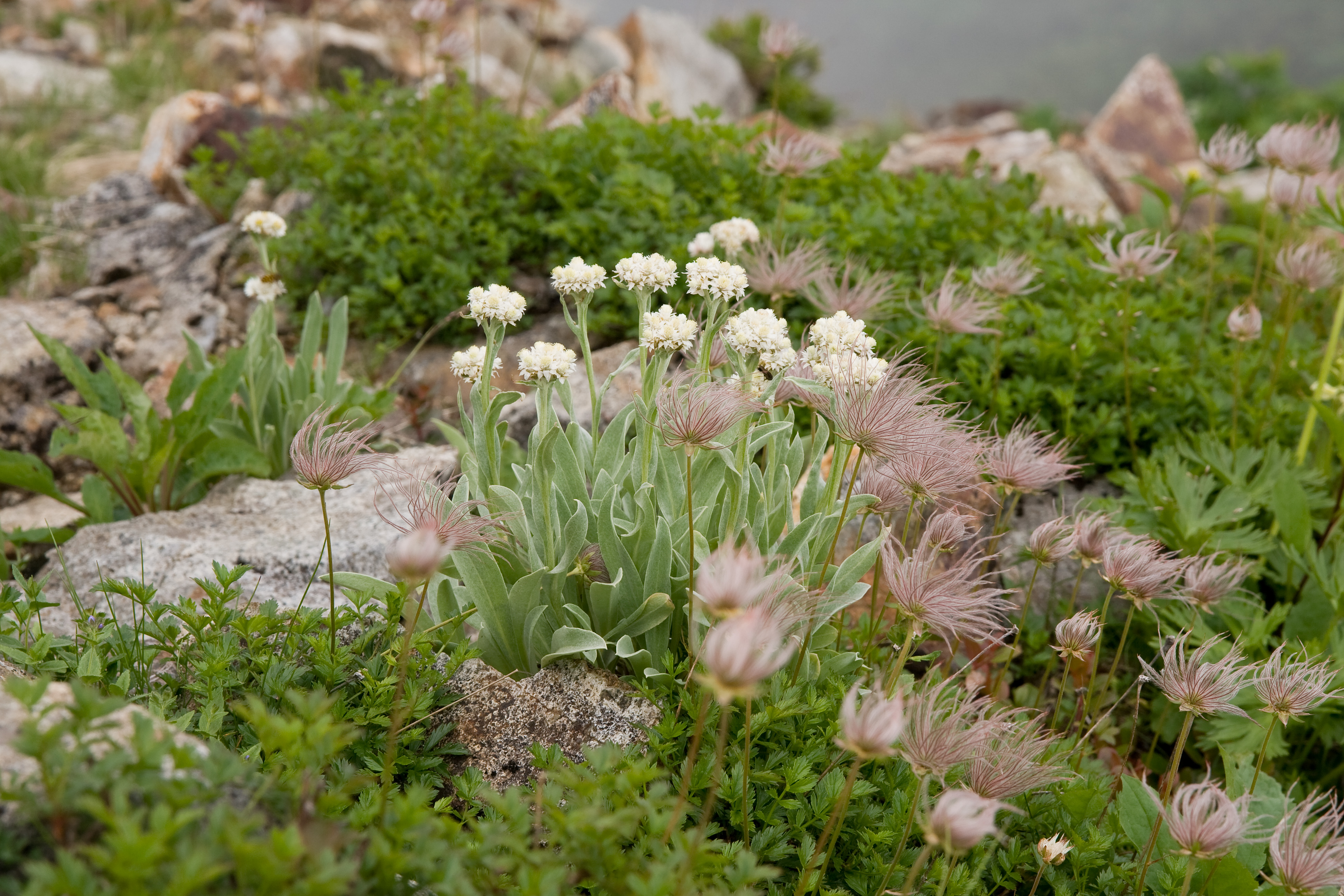 タカネヤハズハハコ (学名：Anaphalis alpicola)